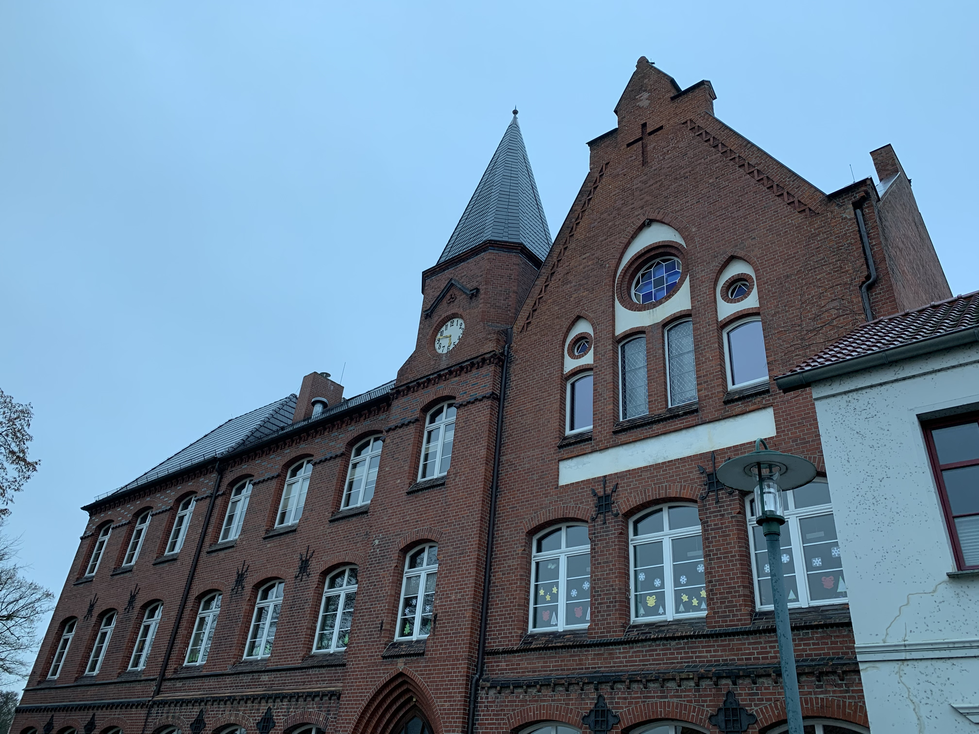 Die Rote Schule ist ein denkmalgeschütztes Gebäude in Strasburg (Uckermark) in Mecklenburg-Vorpommern. Sie wird im 21. Jahrhundert als Grundschule genutzt.